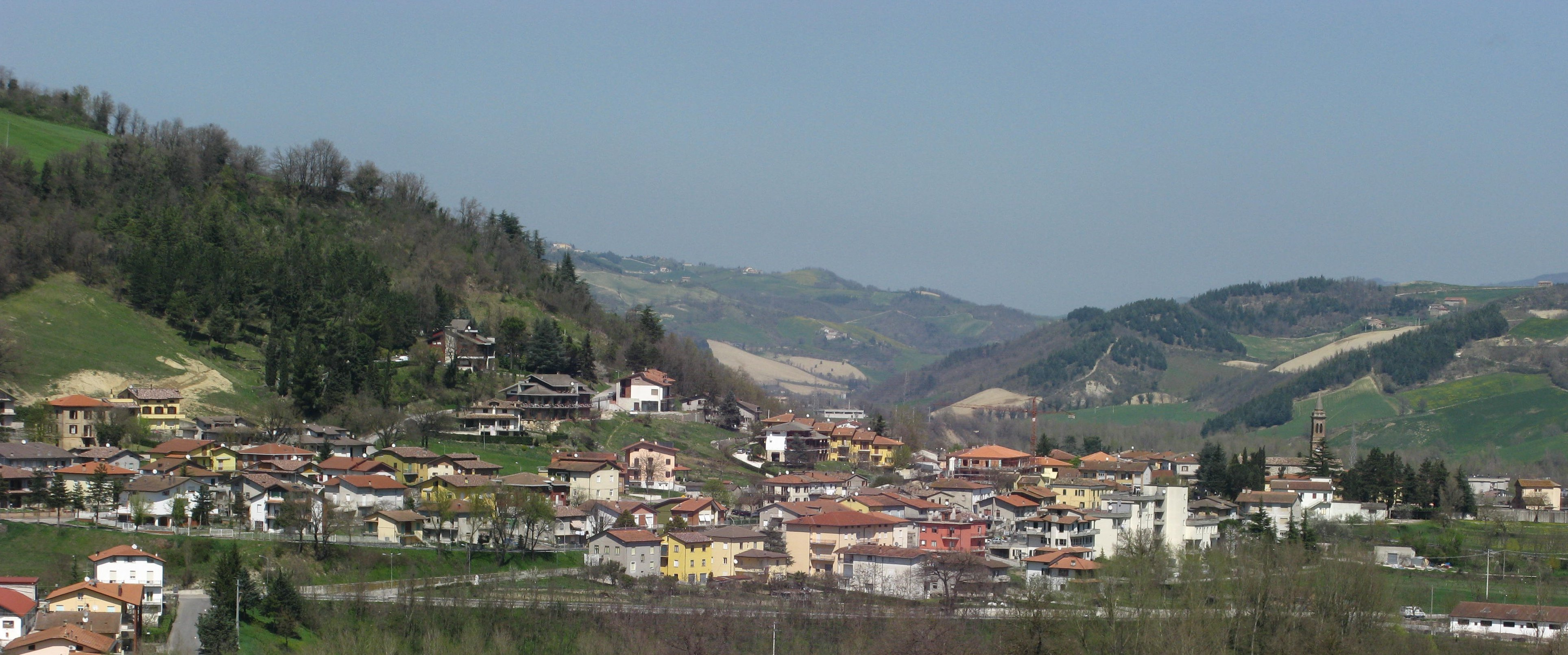 Panorama di Lunano.